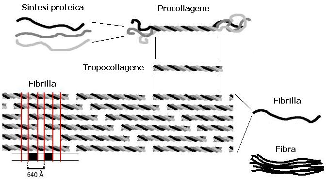 Formazione di una fibra collagene a partire dalle catene polipeptidiche.